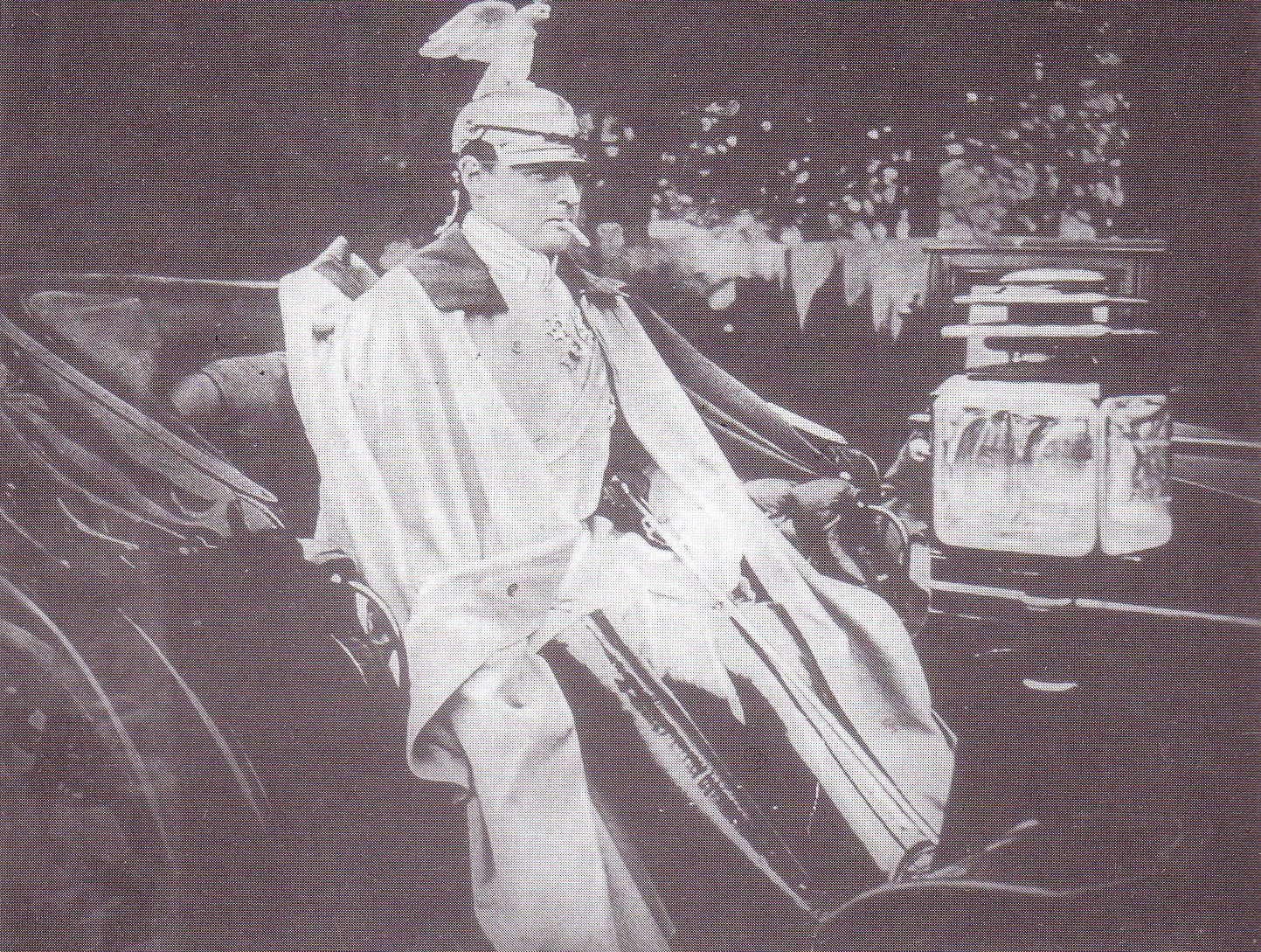 Fotografie von Theodor Bumiller als Garde-Offizier